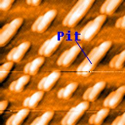 Aufnahme der Pits einer CD mit einem AFM